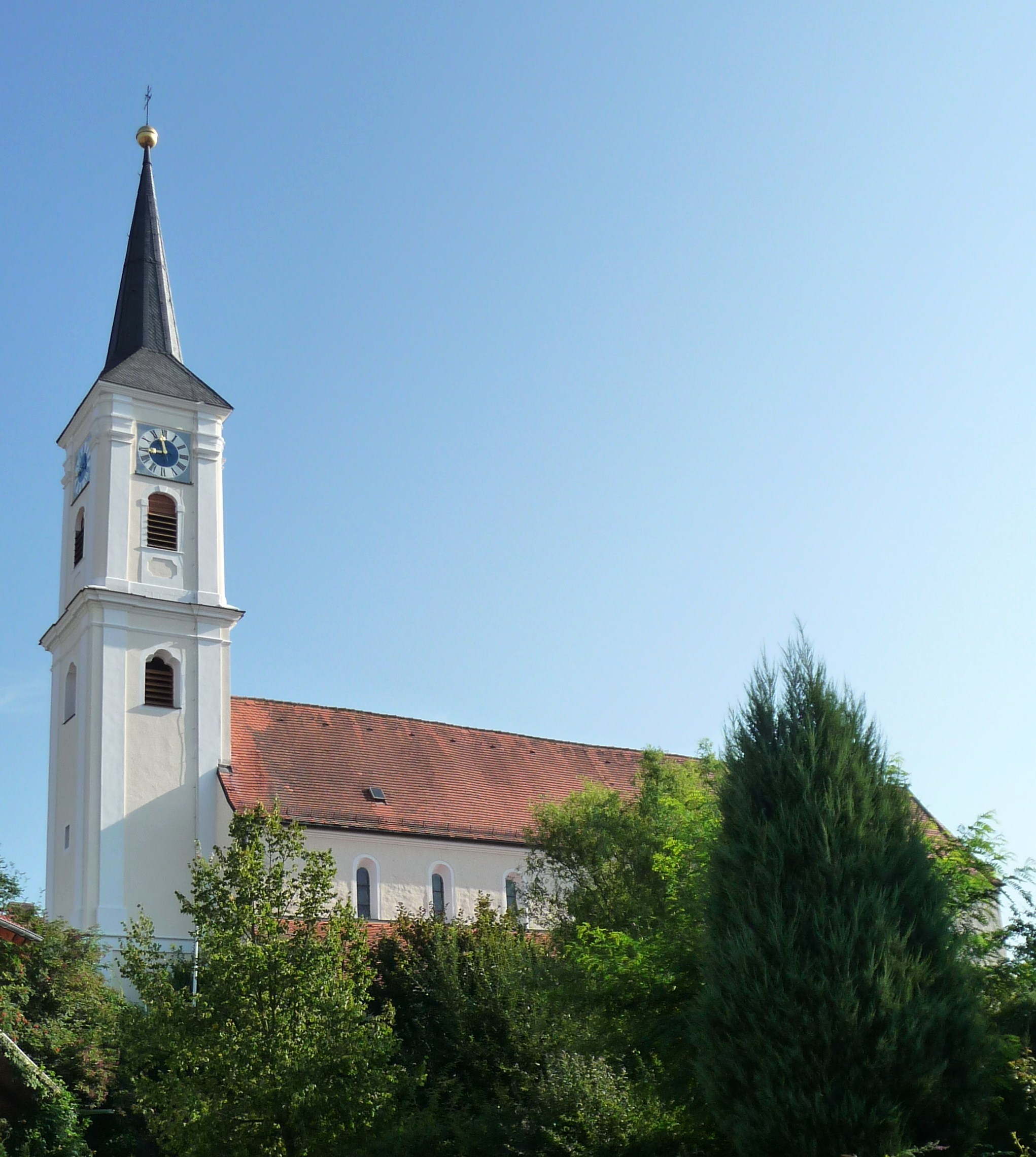 Die Pfarrkirche und ehemalige Stiftskirche St. Tiburtius in Münster